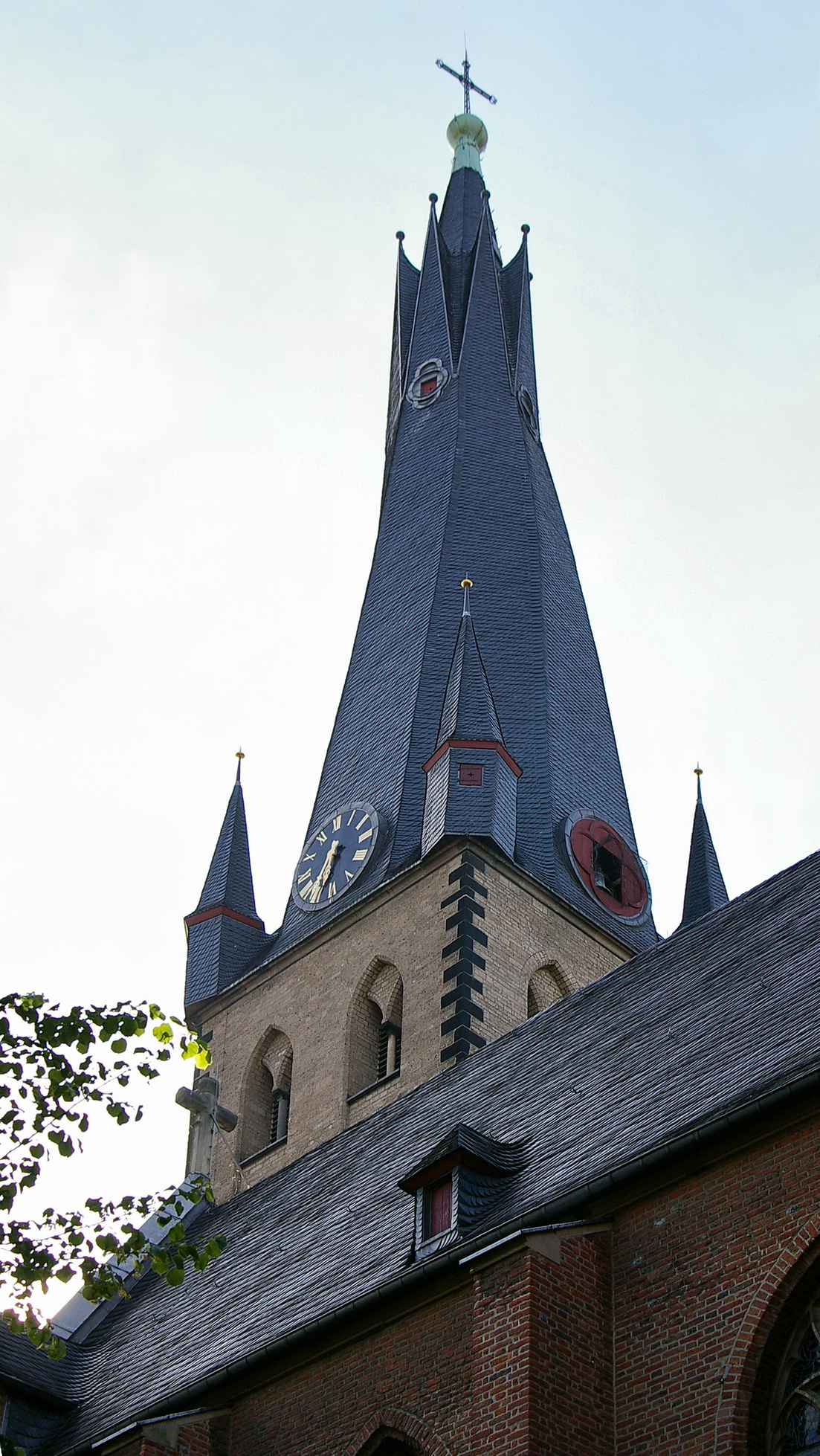 Kirchturm von Sankt Lambertus in Düsseldorf vom Kirchhof aus gesehen.